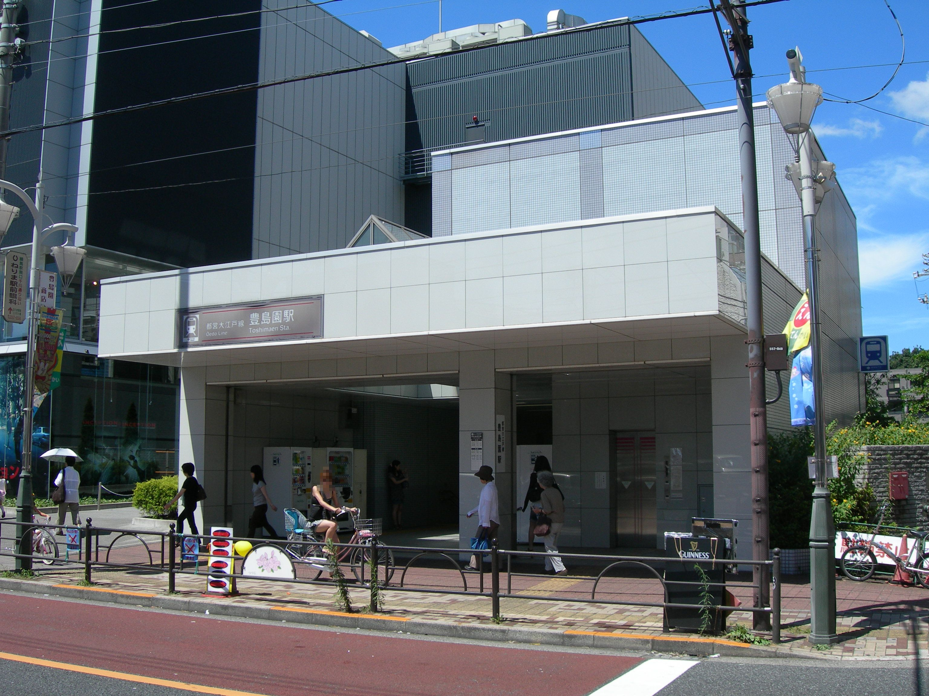 豊島園駅A2出入口